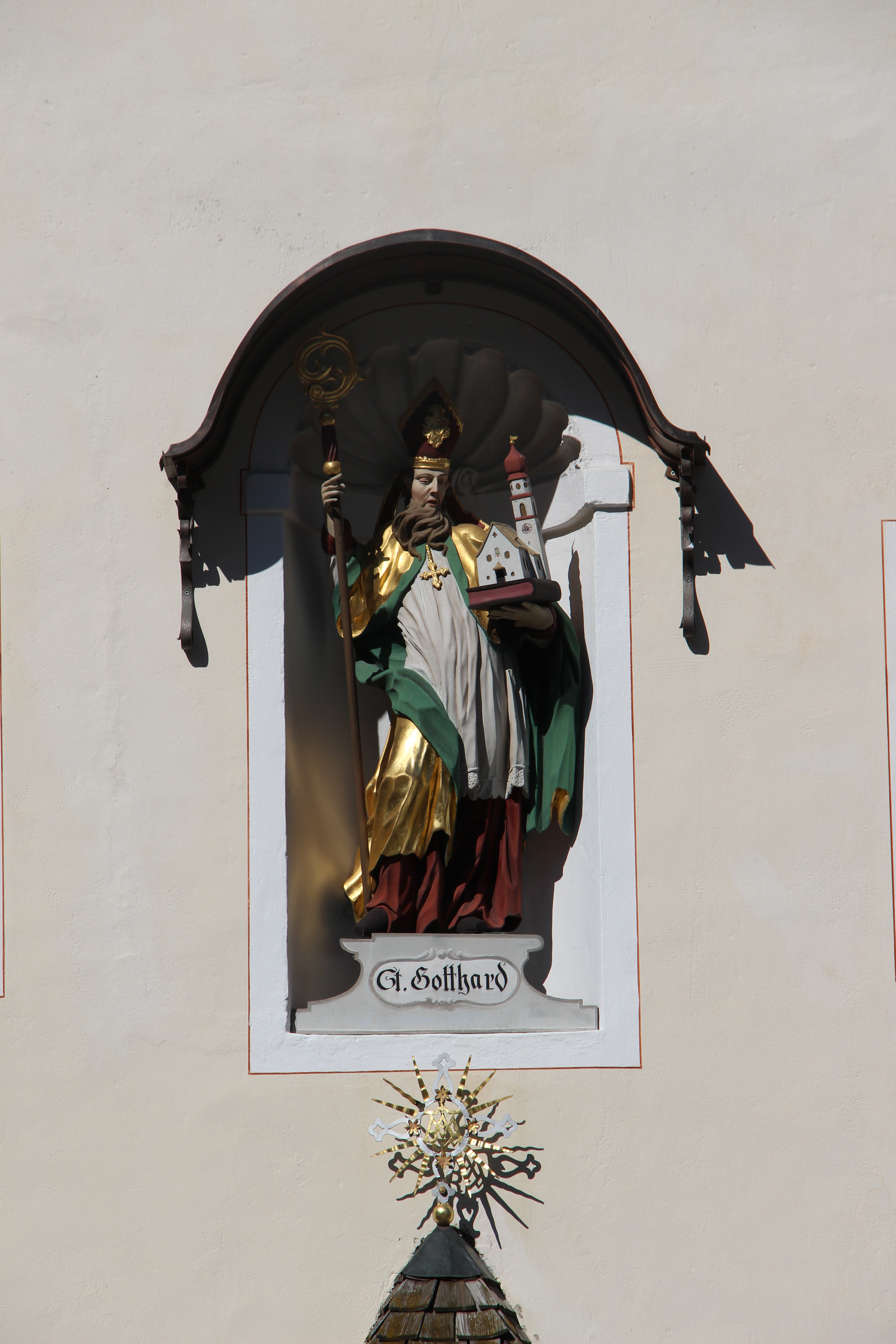 Kath. Pfarrkirche hl. Gotthard und Friedhof